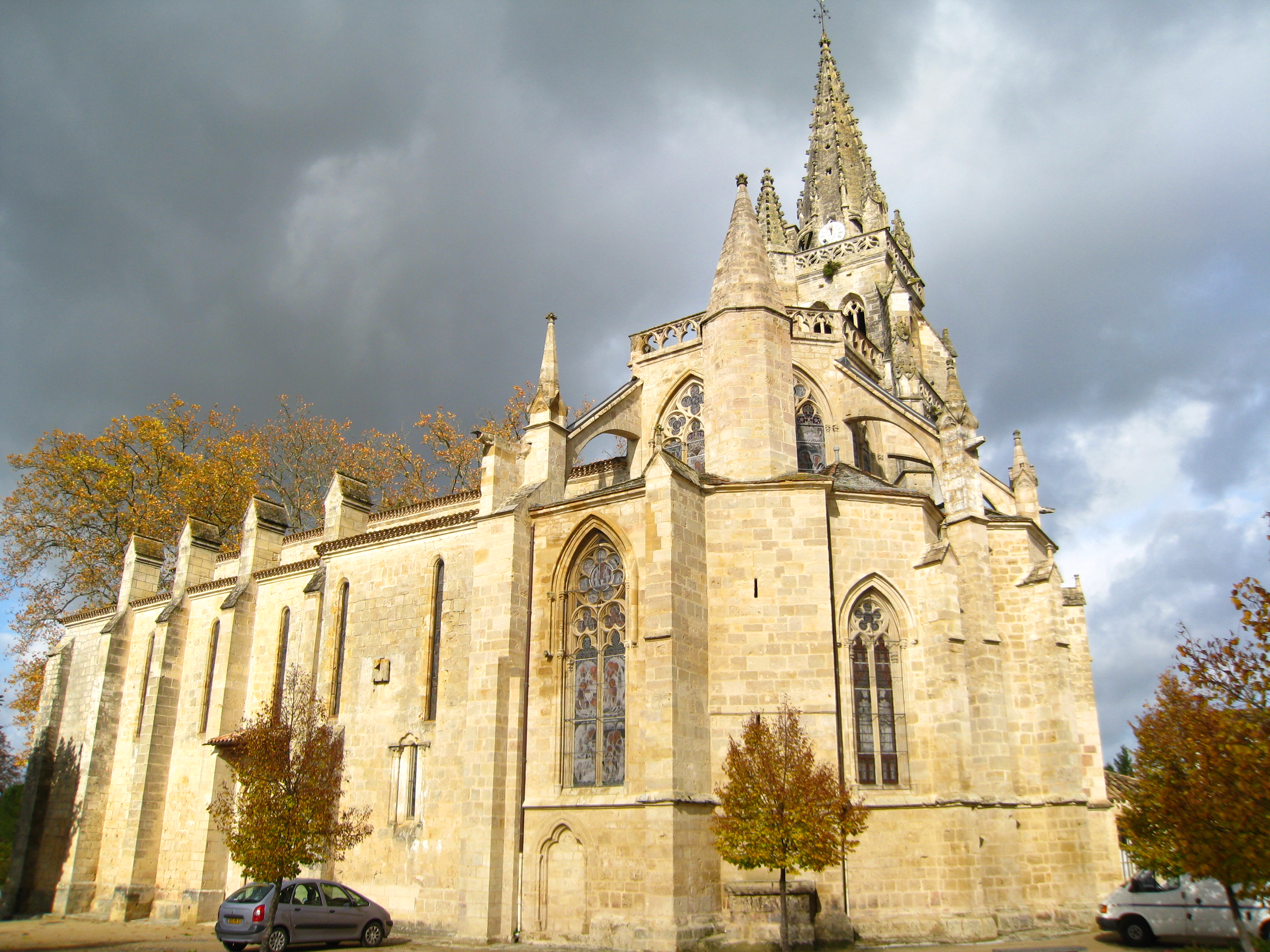 collégiale d'Uzeste en Gironde